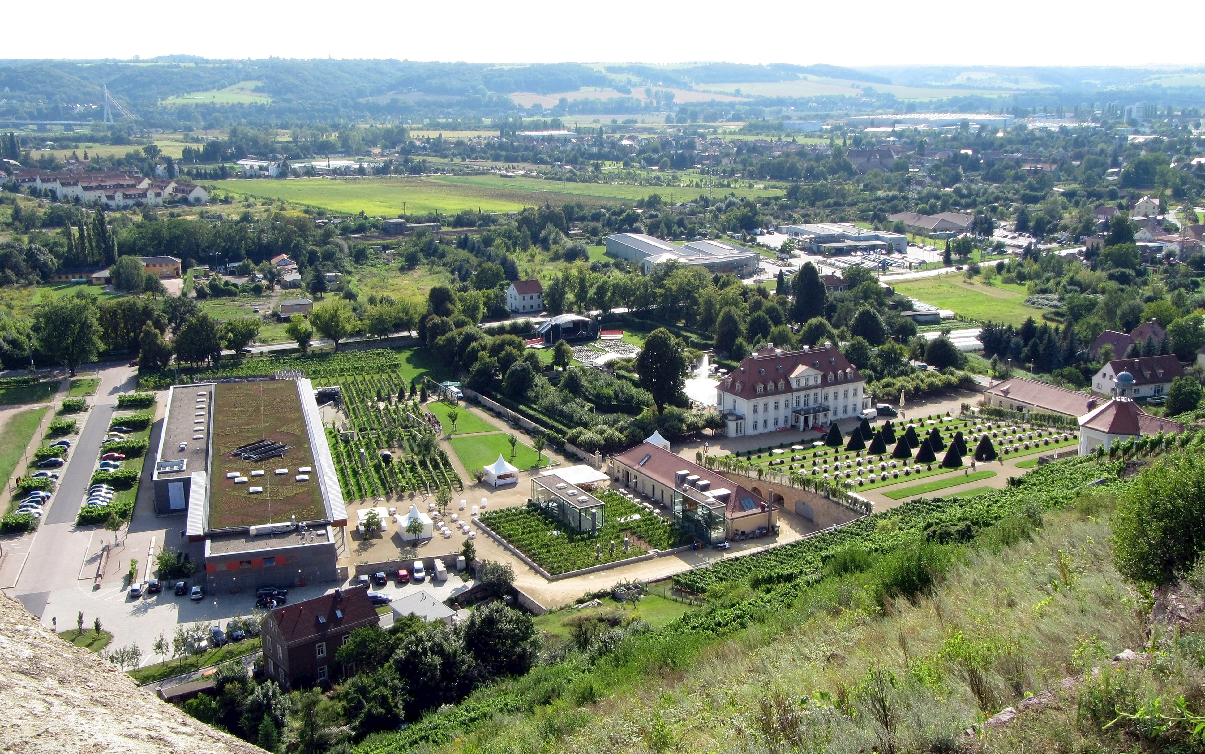 Schloss Wackerbarth und Umgebung